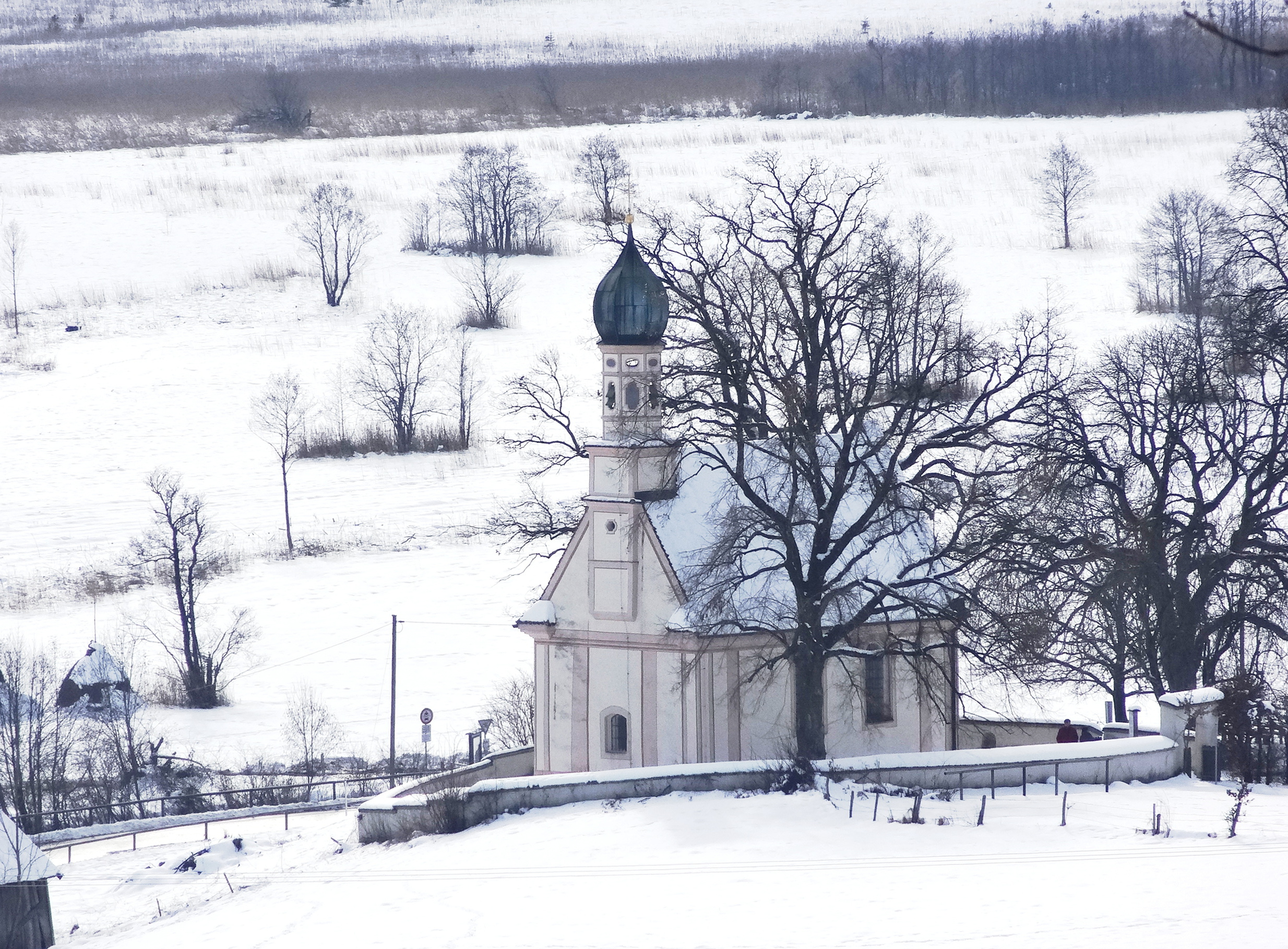 Ramsachkircherl von Nordost